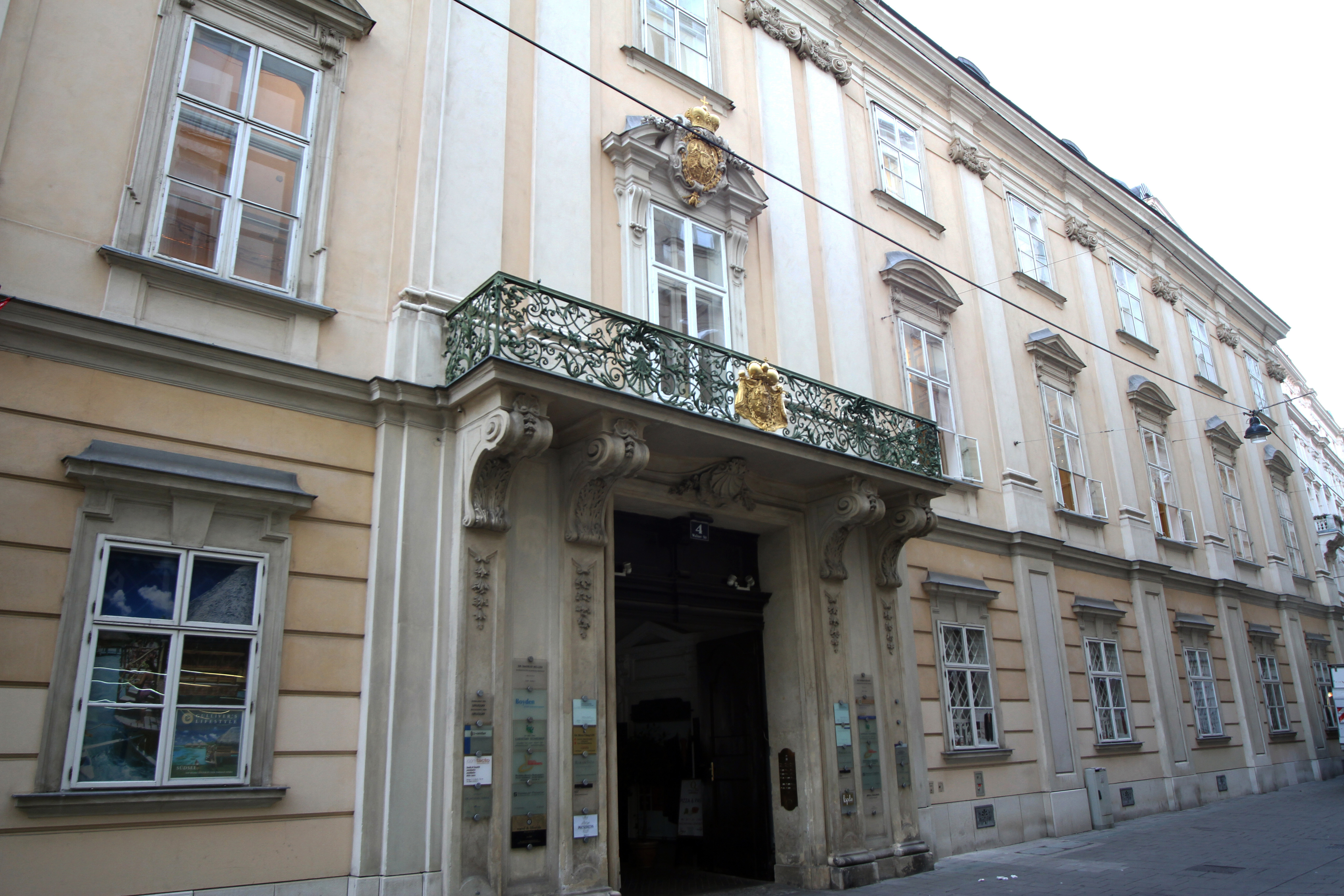 Palais Esterházy